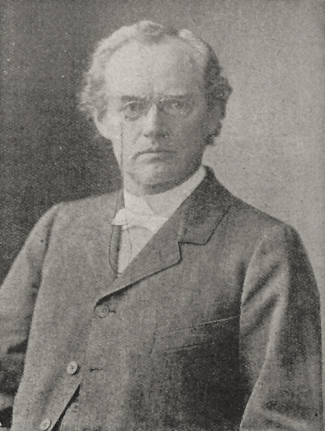 Karl Knortz (Foto vor 1911) in der Wochenendzeitschrift Rhein und Düssel vom 26. August 1911